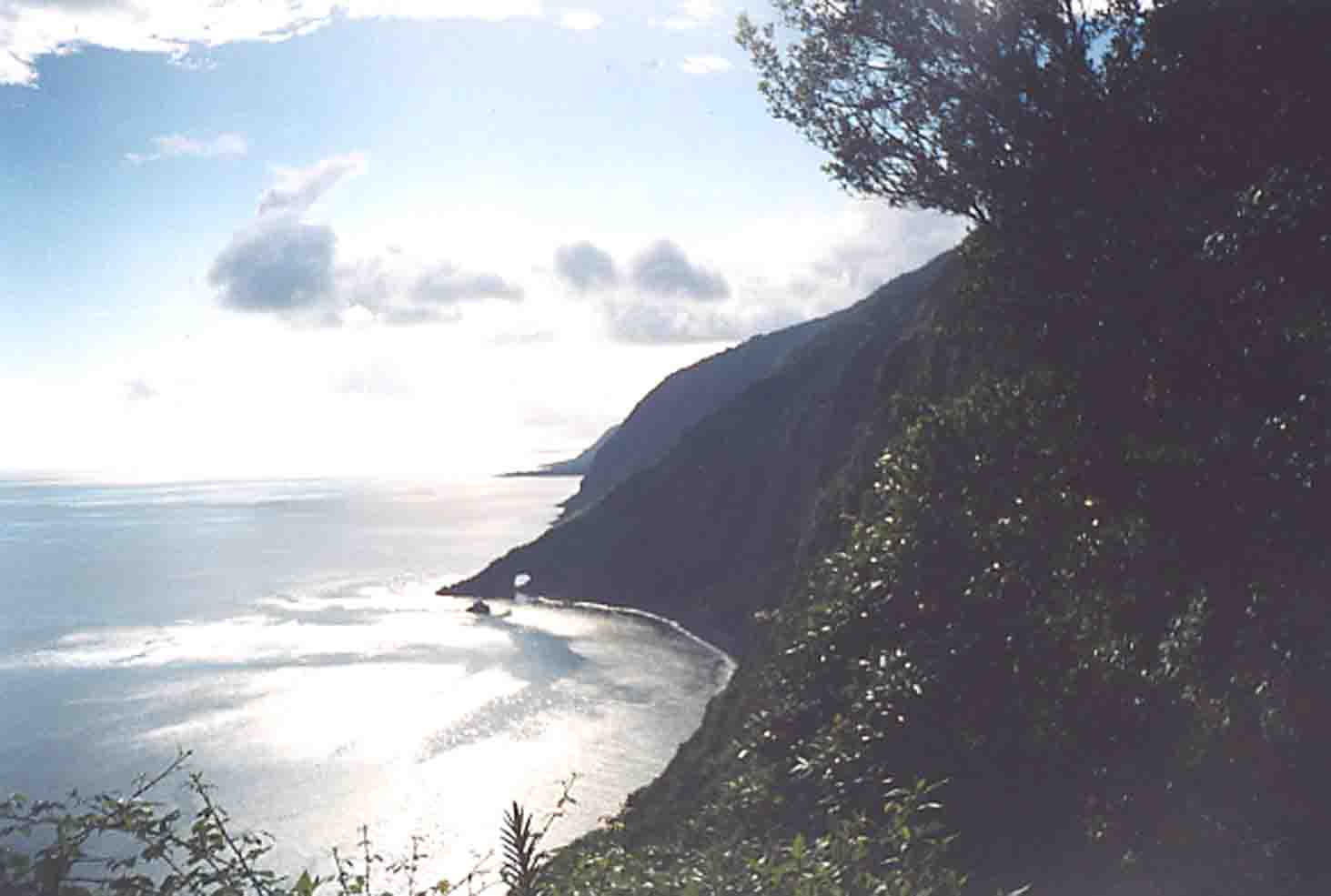 Fajã da Ponta furada, ilha de são Jorge, Açores, Portugal.